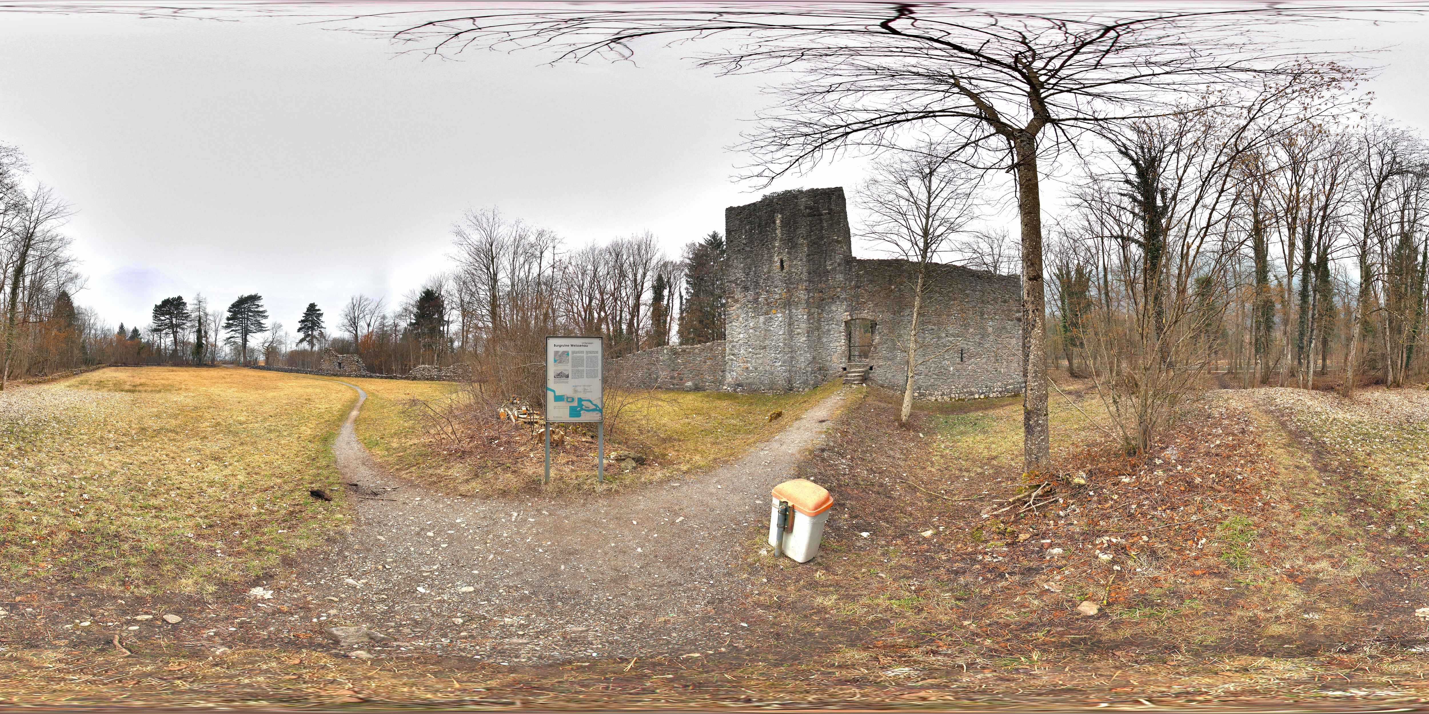 Burgruine Weissenau hinter den Mauern